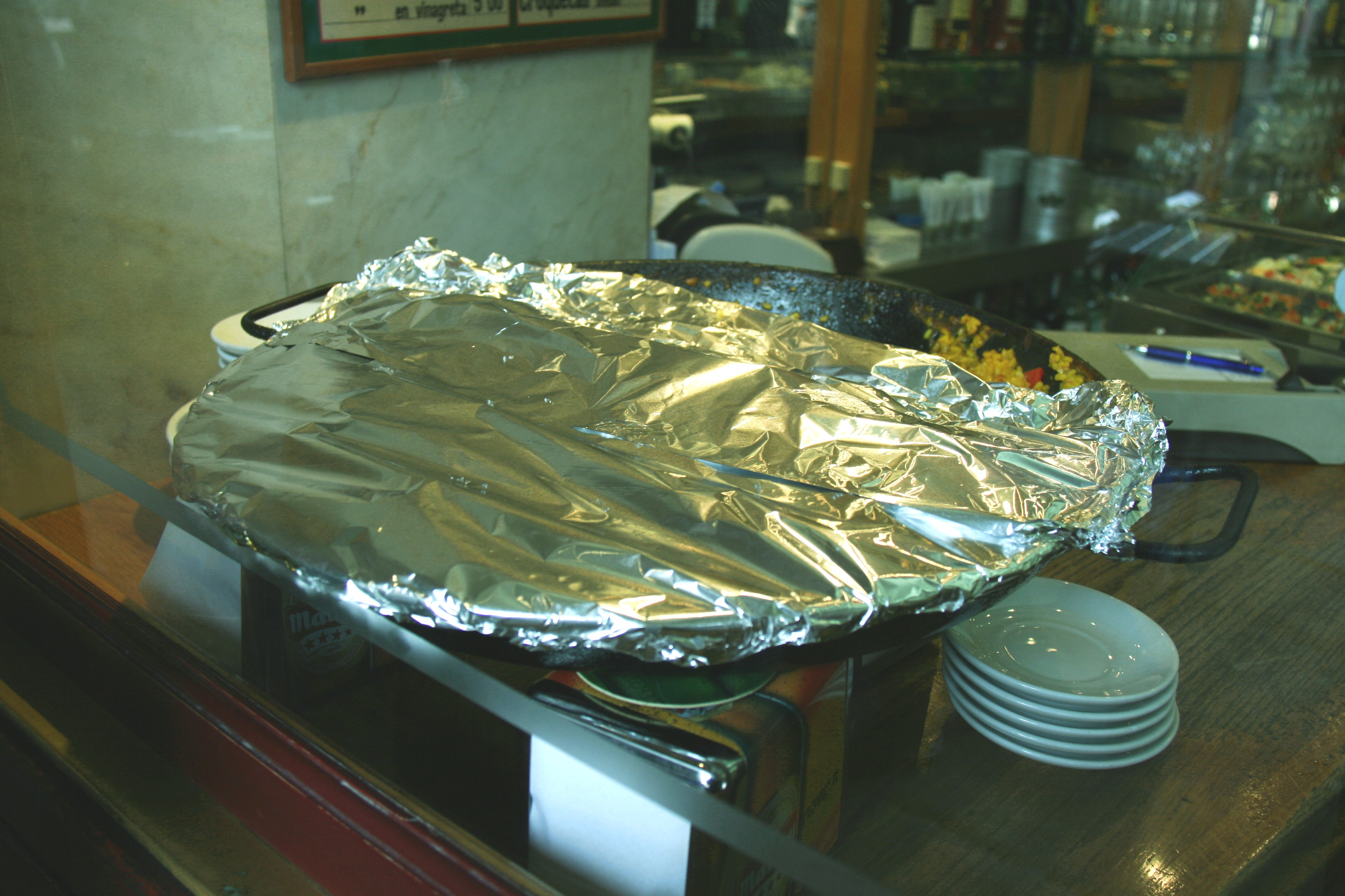 Paella reposando en papel de alumninio